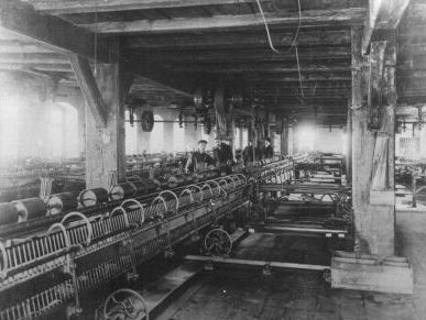 Opatówek, Poland, manufaktura Fiedlera